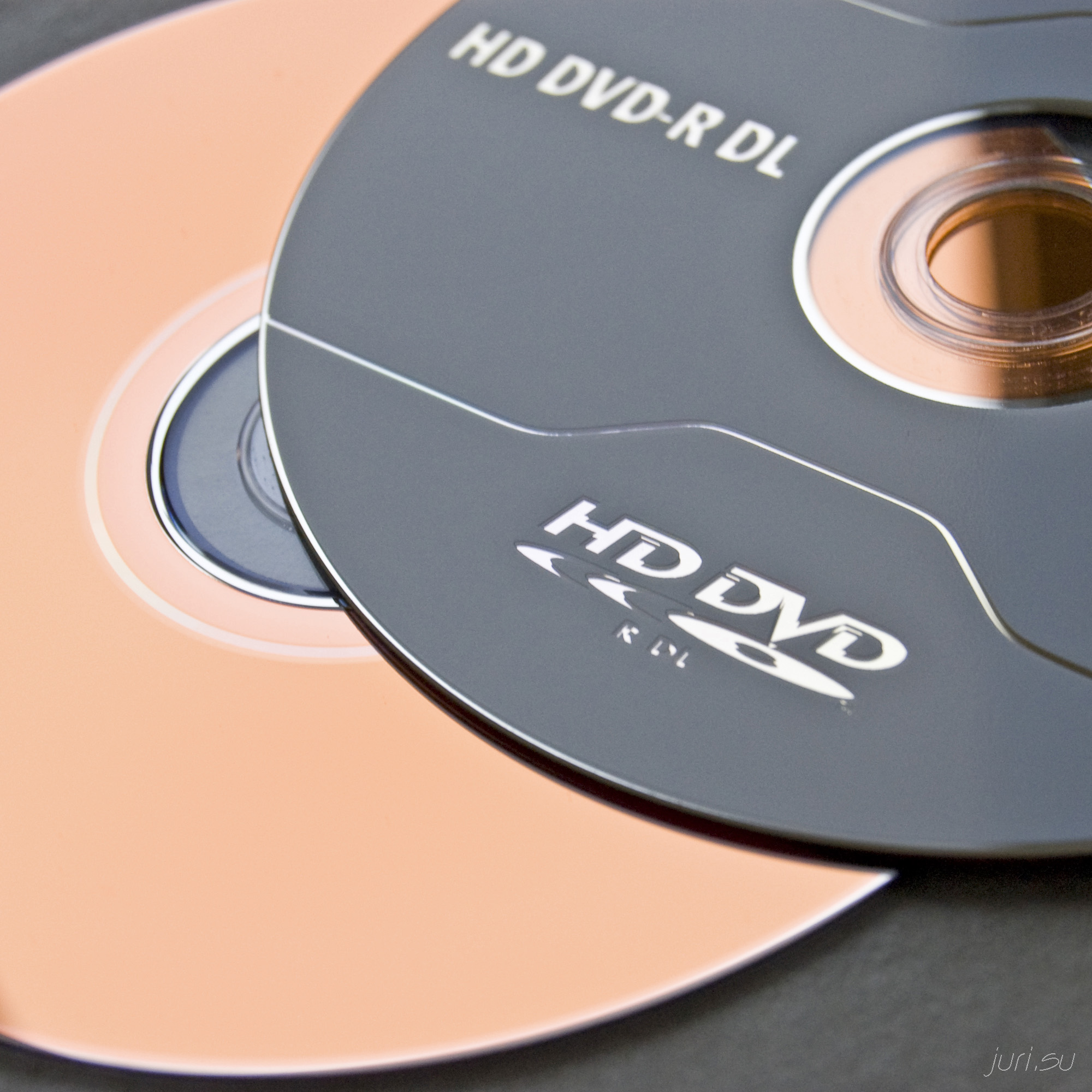 Обратная сторона диска HD DVD-R